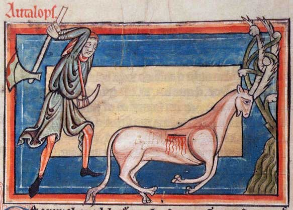 Darstellung der Antilope (Fabelwesen) im Harley-Bestiarium (1240)